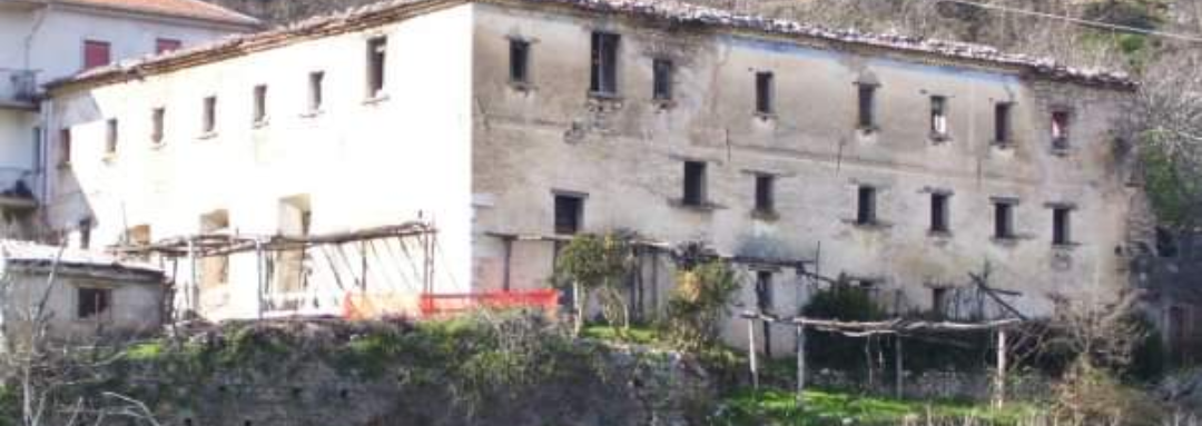 Convento Cappuccini Marsico Nuovo - Facciata